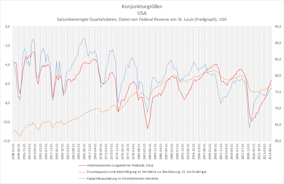 Konjunkturgrößen der USA